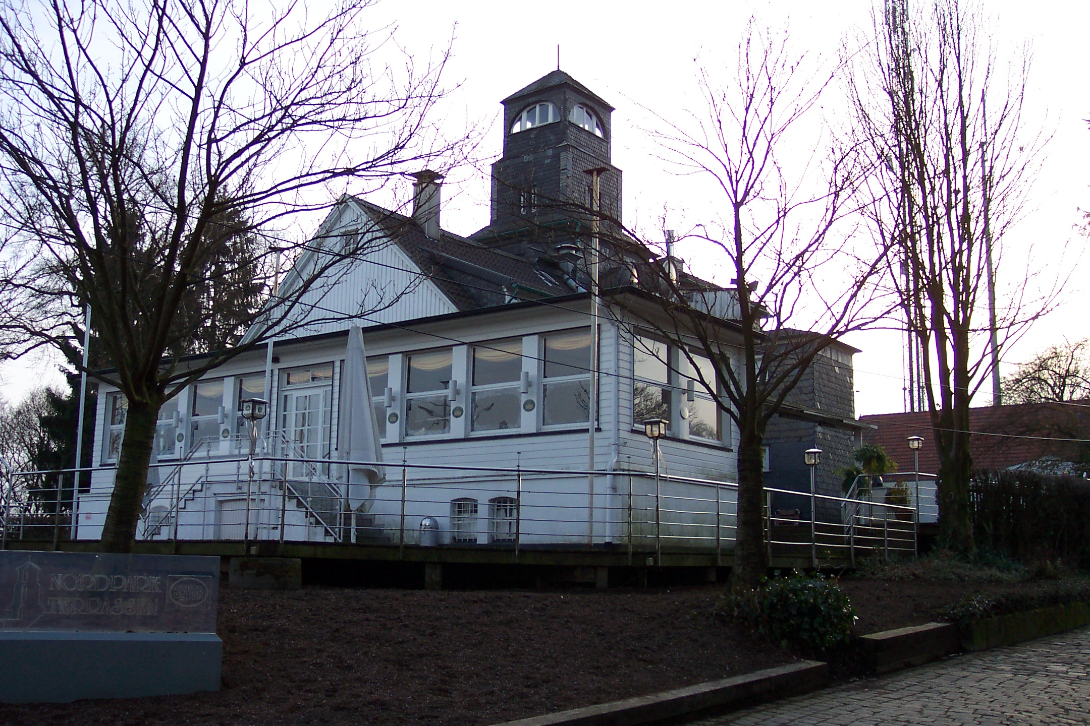 Nordpark, Wuppertal